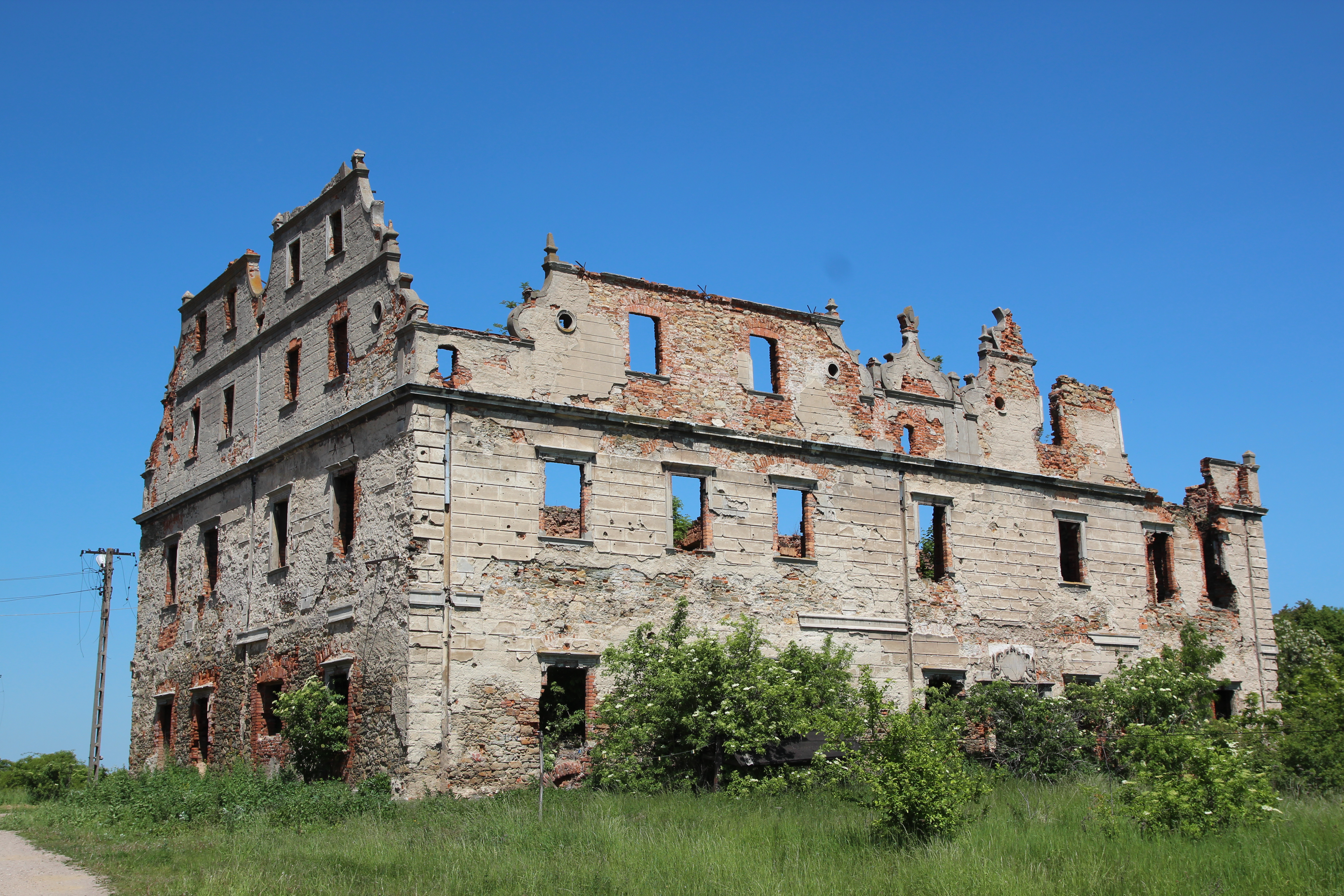 Ruina manierystycznego dworu z 1613 r. w Borzygniewie.